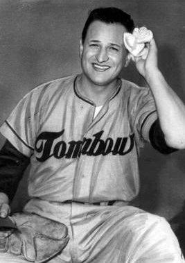 トンボ・ユニオンズ時代のヴィクトル・スタルヒン